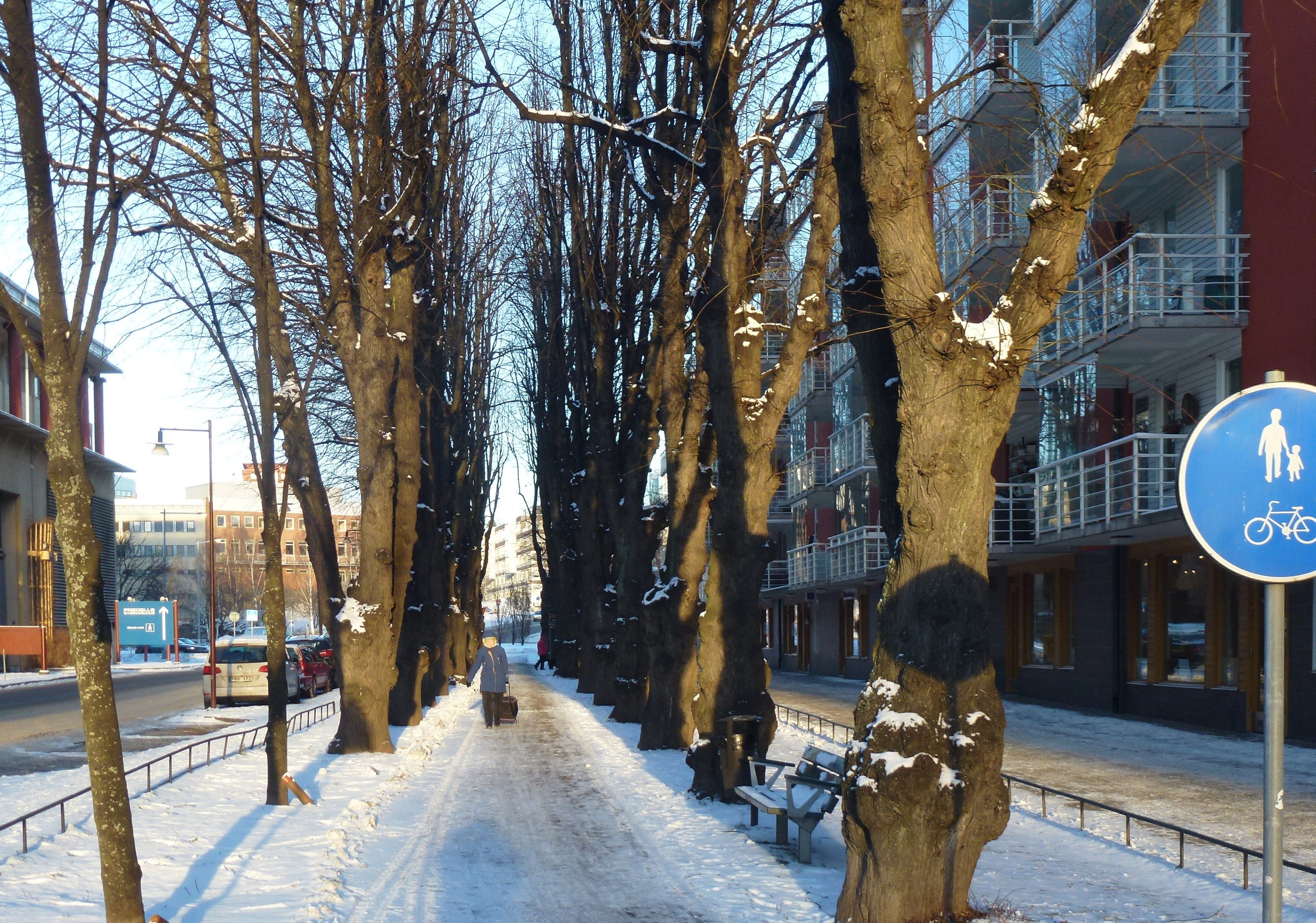 Sickla allé, vy mot norr